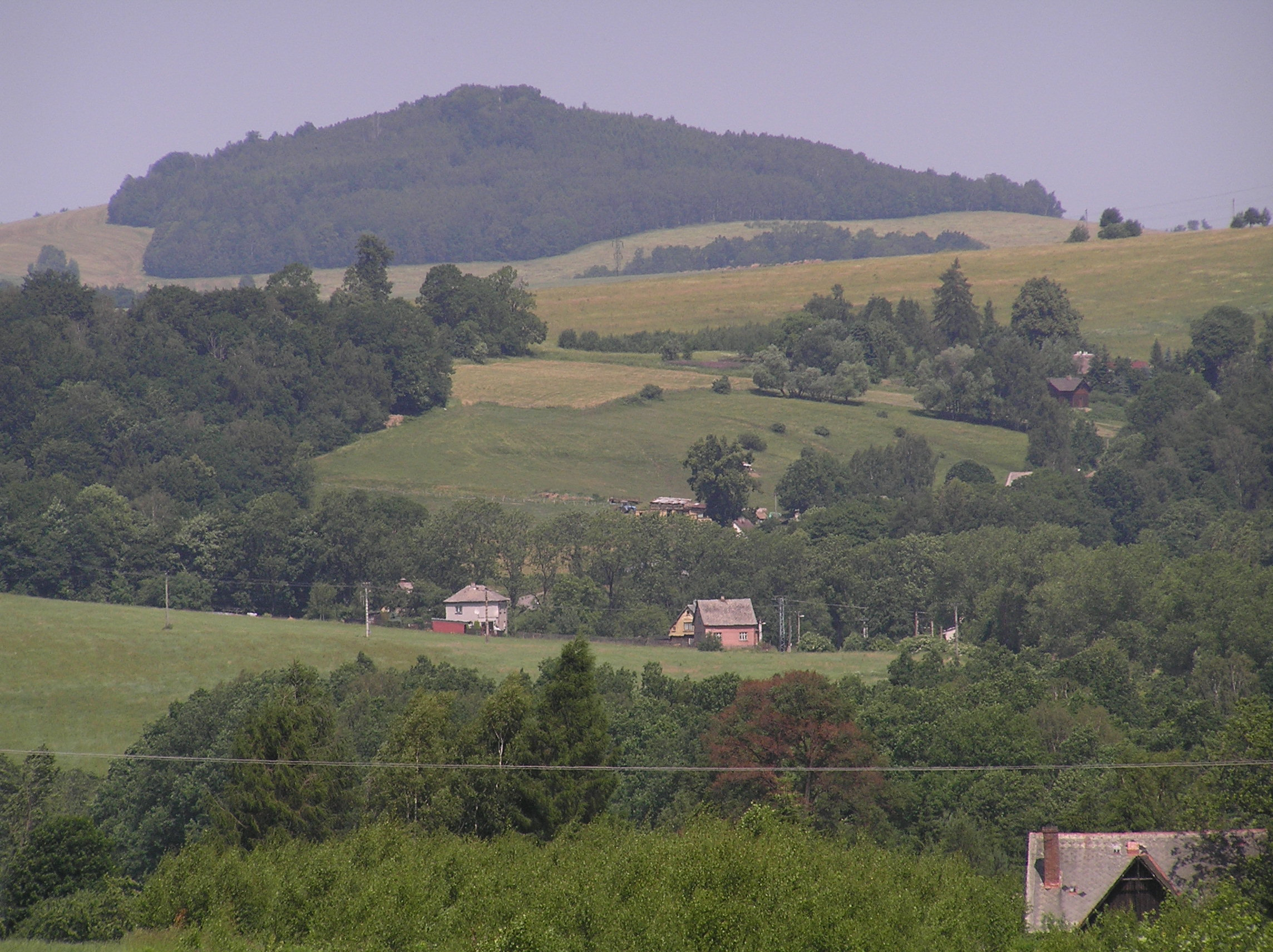 Výhledy (Gickelsberg, 569 m) a osada Růžek od chrastavské Vísky